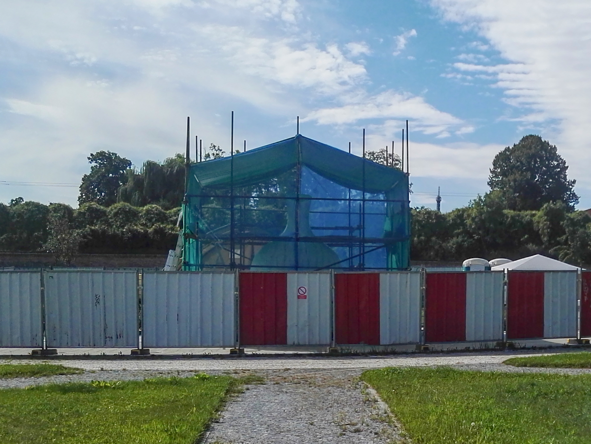 Praha, park Marie Terezie na Hradčanech, rozestavěný pomník císařovny v srpnu 2020